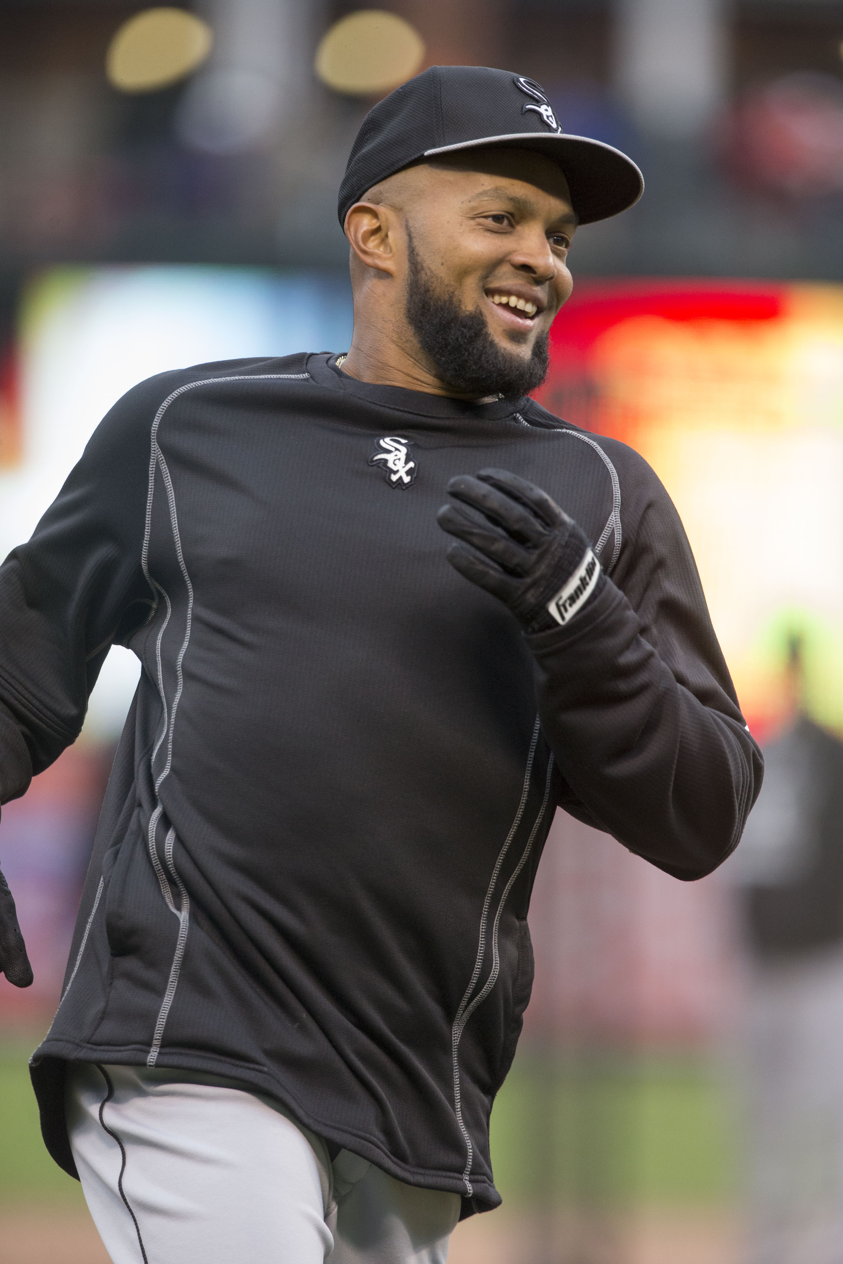 Emilio Bonifacio